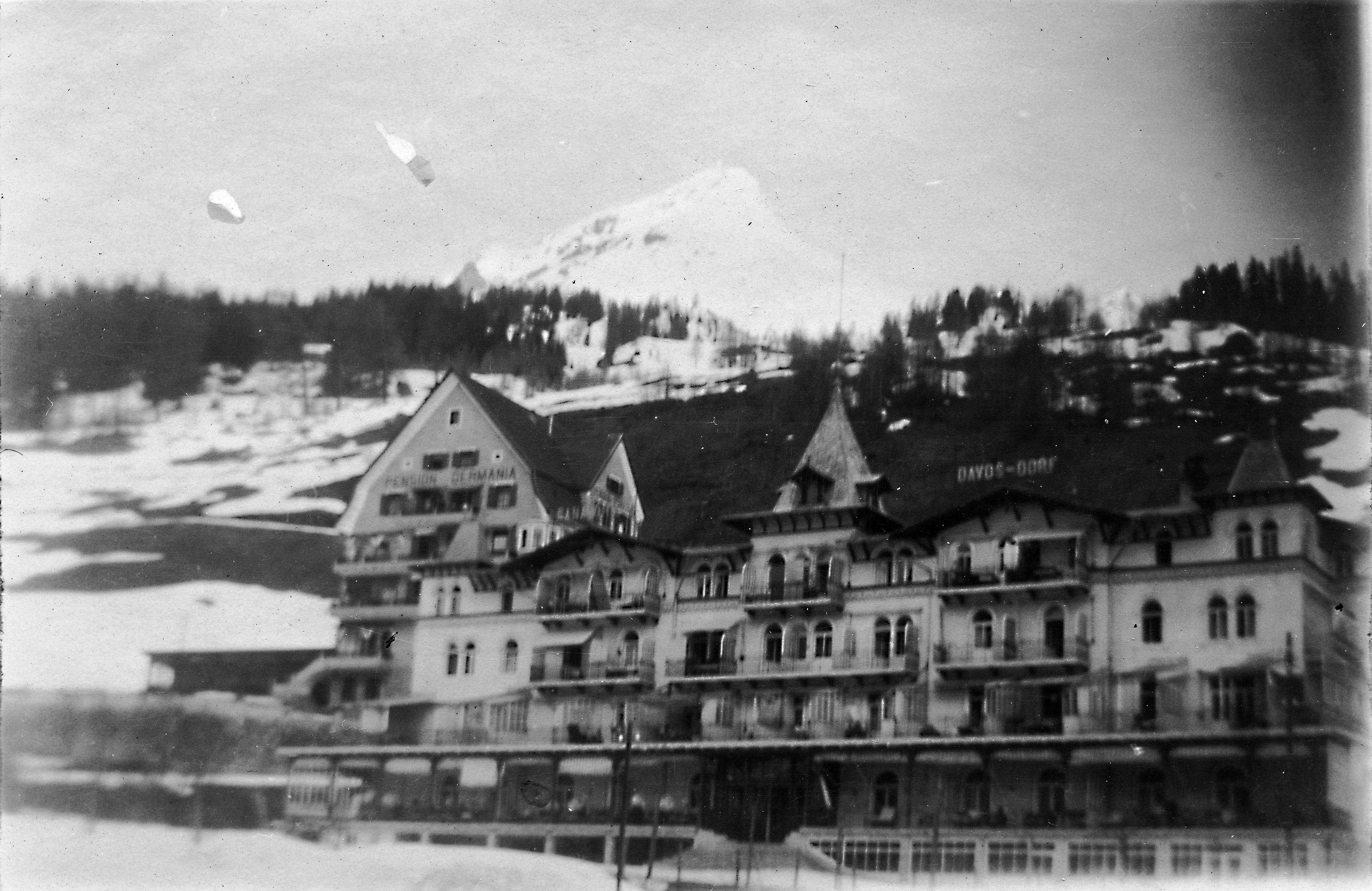 Sanatorium Davos-Dorf. Edith Södergrans samling Signum: slsa566_65 Foto: Edith Södergran Svenska litteratursällskapet i Finland